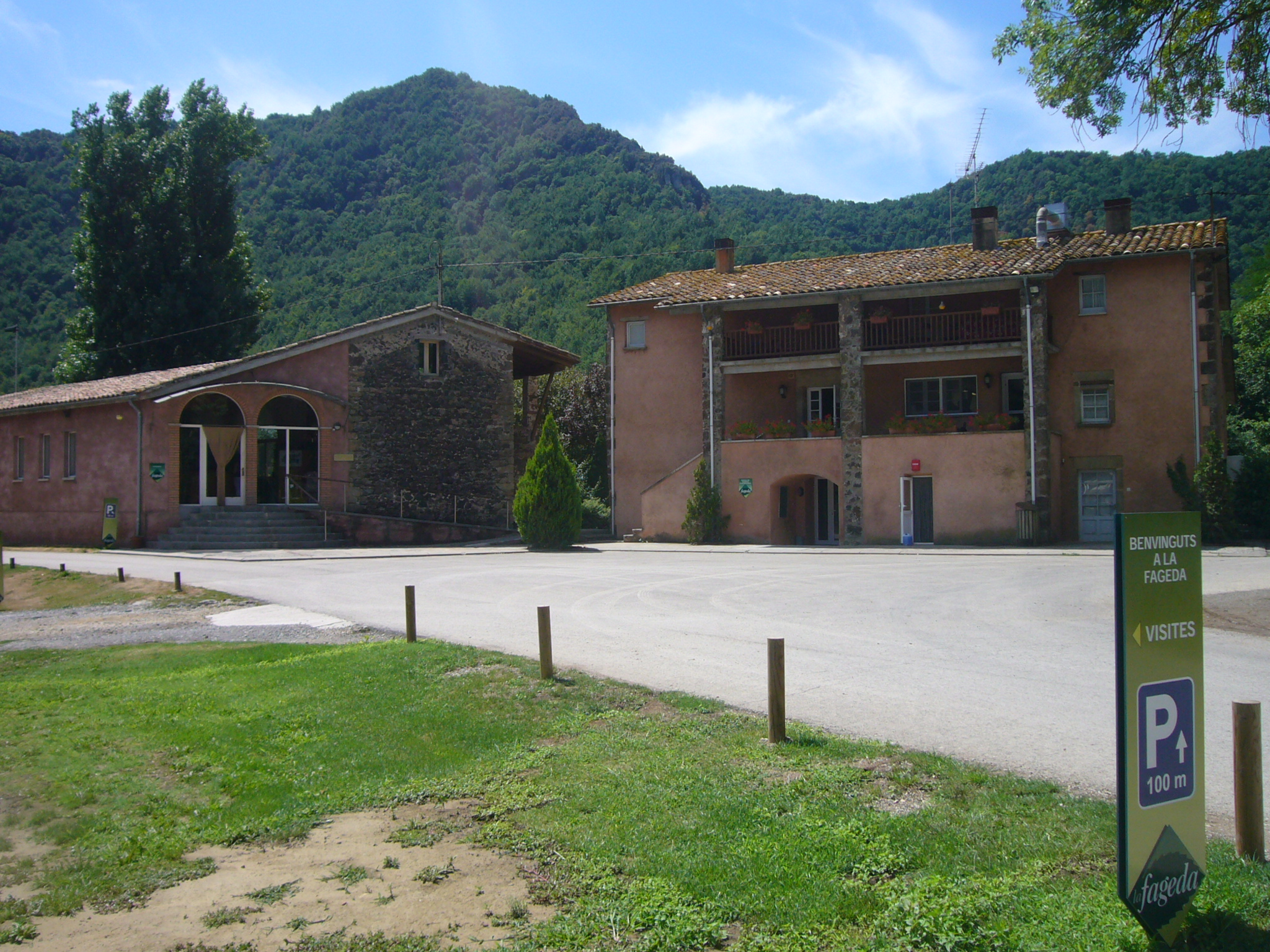 Cooperativa La Fageda - centre de visites